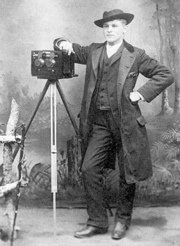 Fotografen John Alvin Anderson